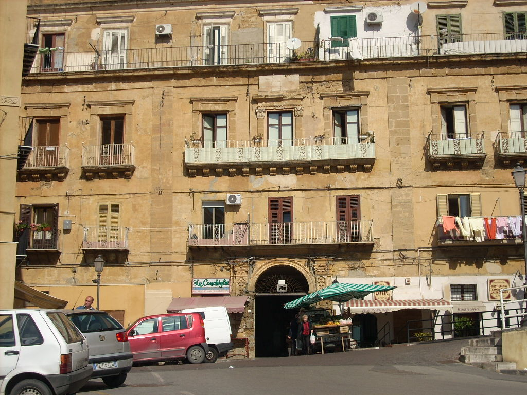 Palazzo Gaetani dei Conti d'Oriseo